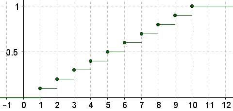 CDF од равномерна распределба со N=10